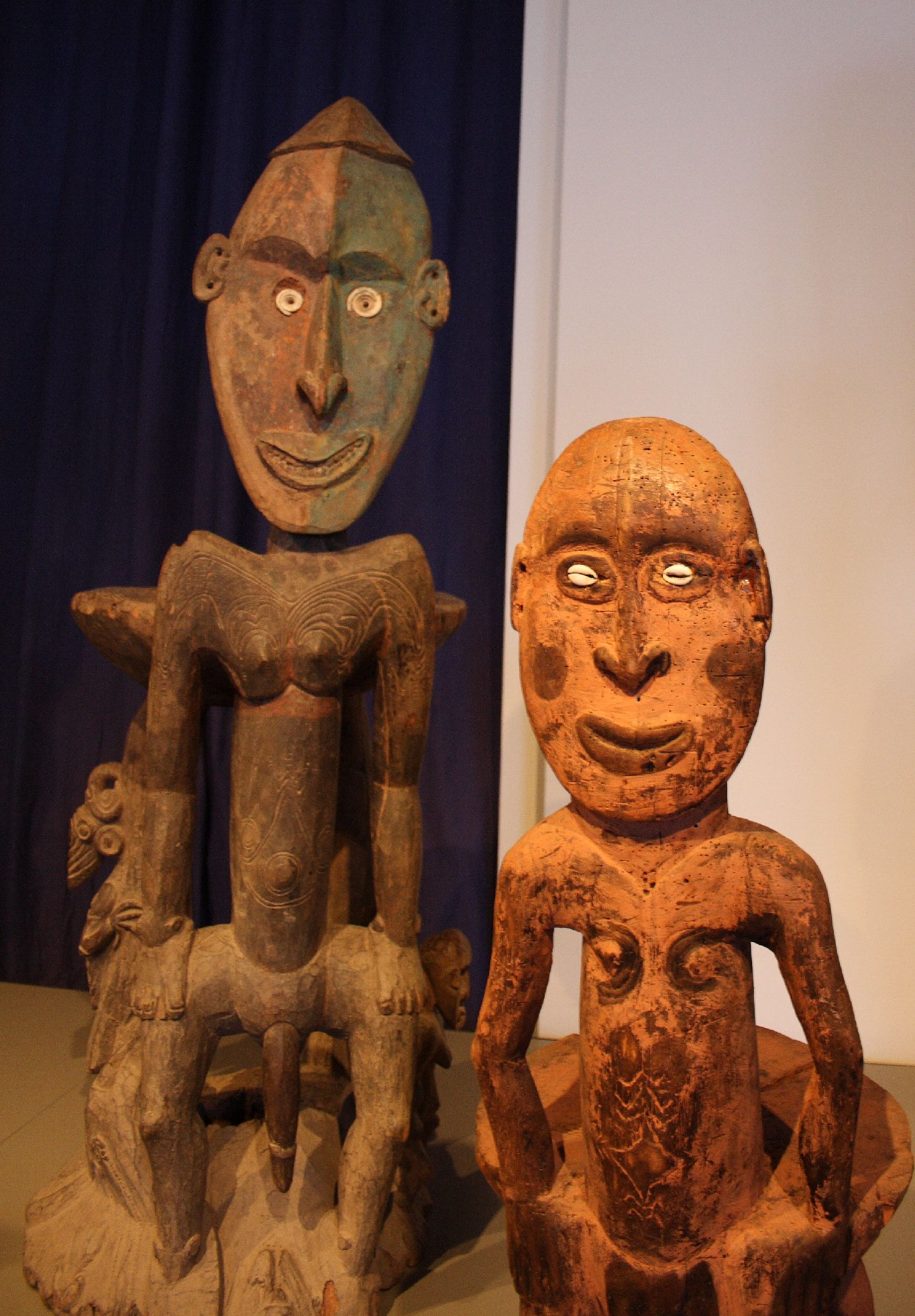 Sepik Redenaarsstoelen (2670-192A/2670-193/2670-194) Sepik Redenaarsstoelen